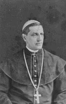 Karel Průcha (1818-1883), český katolický kněz